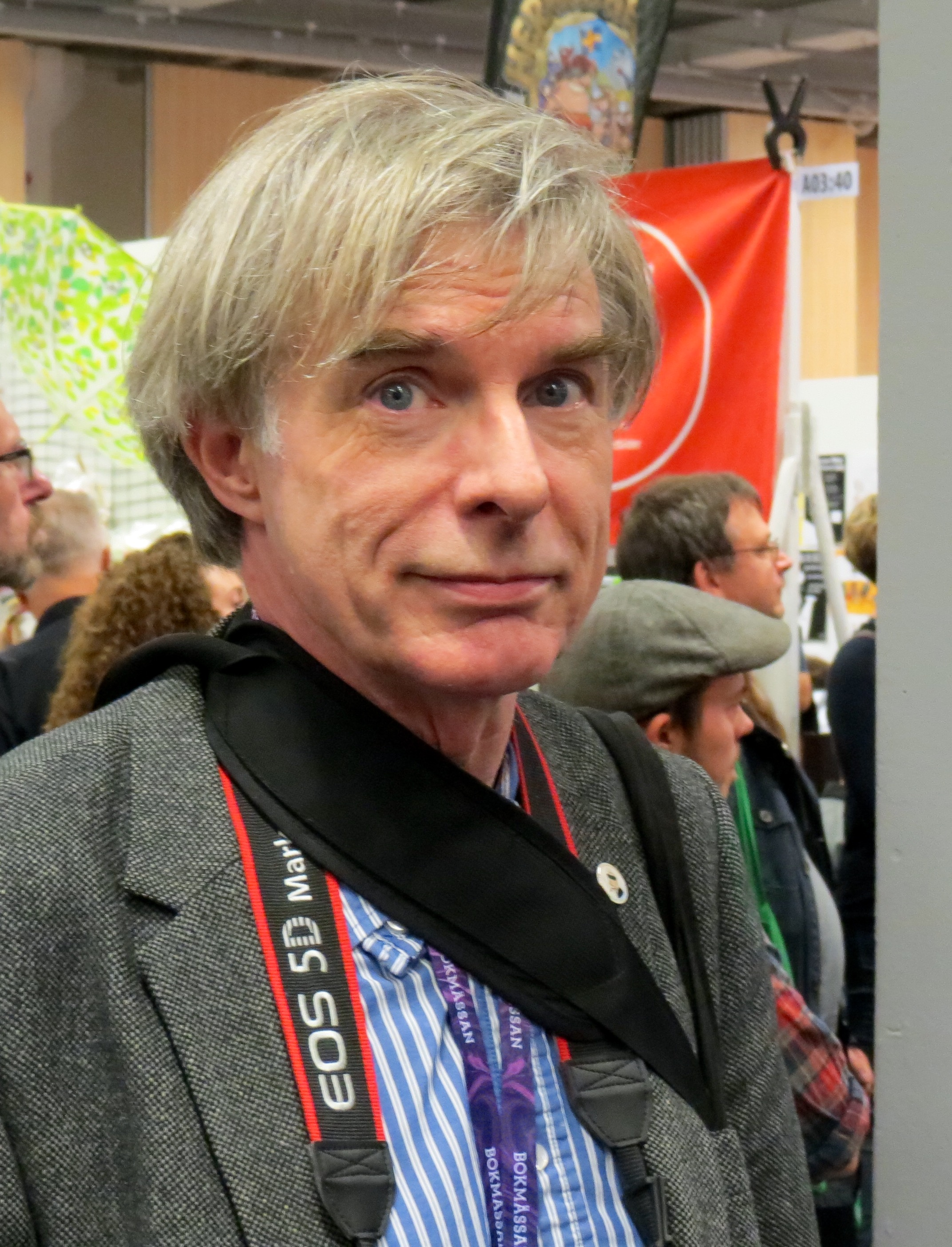 Rolf Lindby